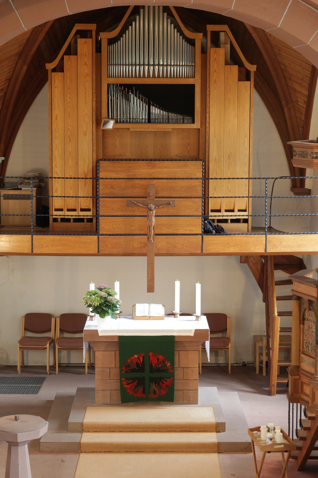 Evangelische Kirche Eichelsdorf, Nidda, Hessen, Deutschland